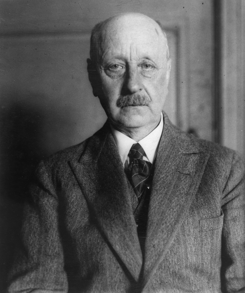 Regissør Lykke-Seest